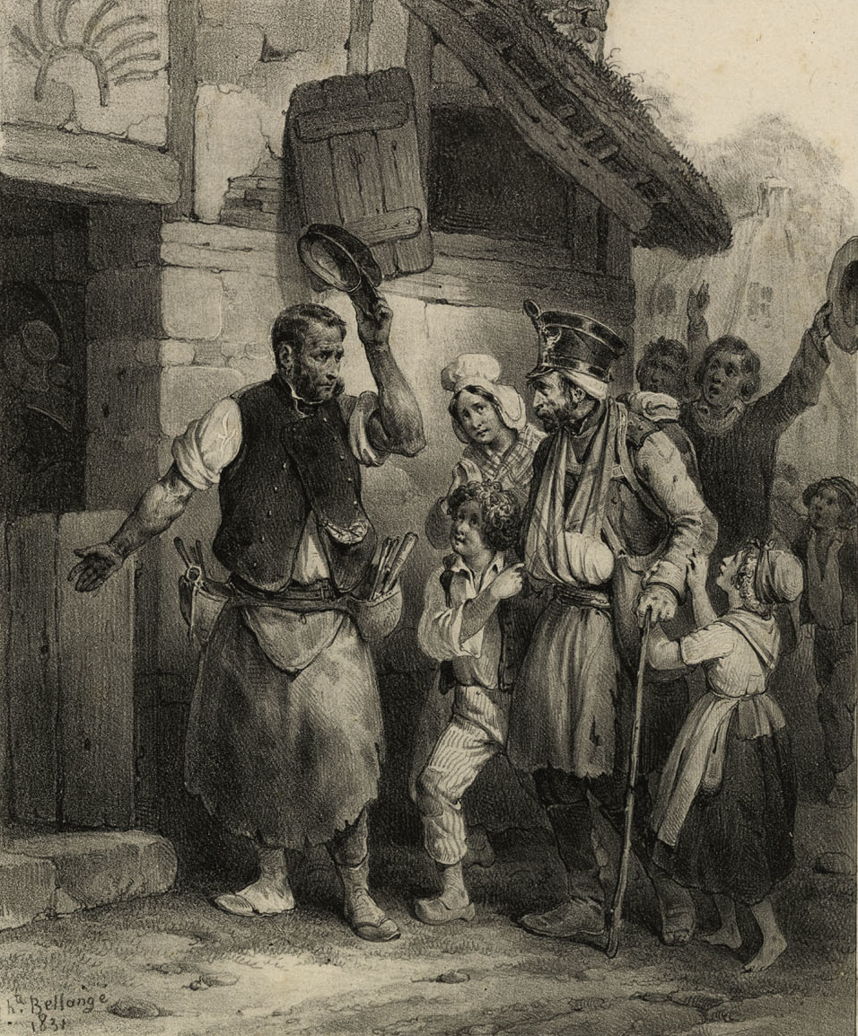 Lith. de Gihaut frères éditeurs, Boulevard des Italiens n° 5 Au dessus du trait carré, au centre : "4" Sous le titre : "Trahi par la victoire / ce proscrit dans nos bois, ... rendons une patrie, / au pauvre exilé. (Beranger)" Dans l'image, en bas, à gauche : "hte. Bellangé 1831"